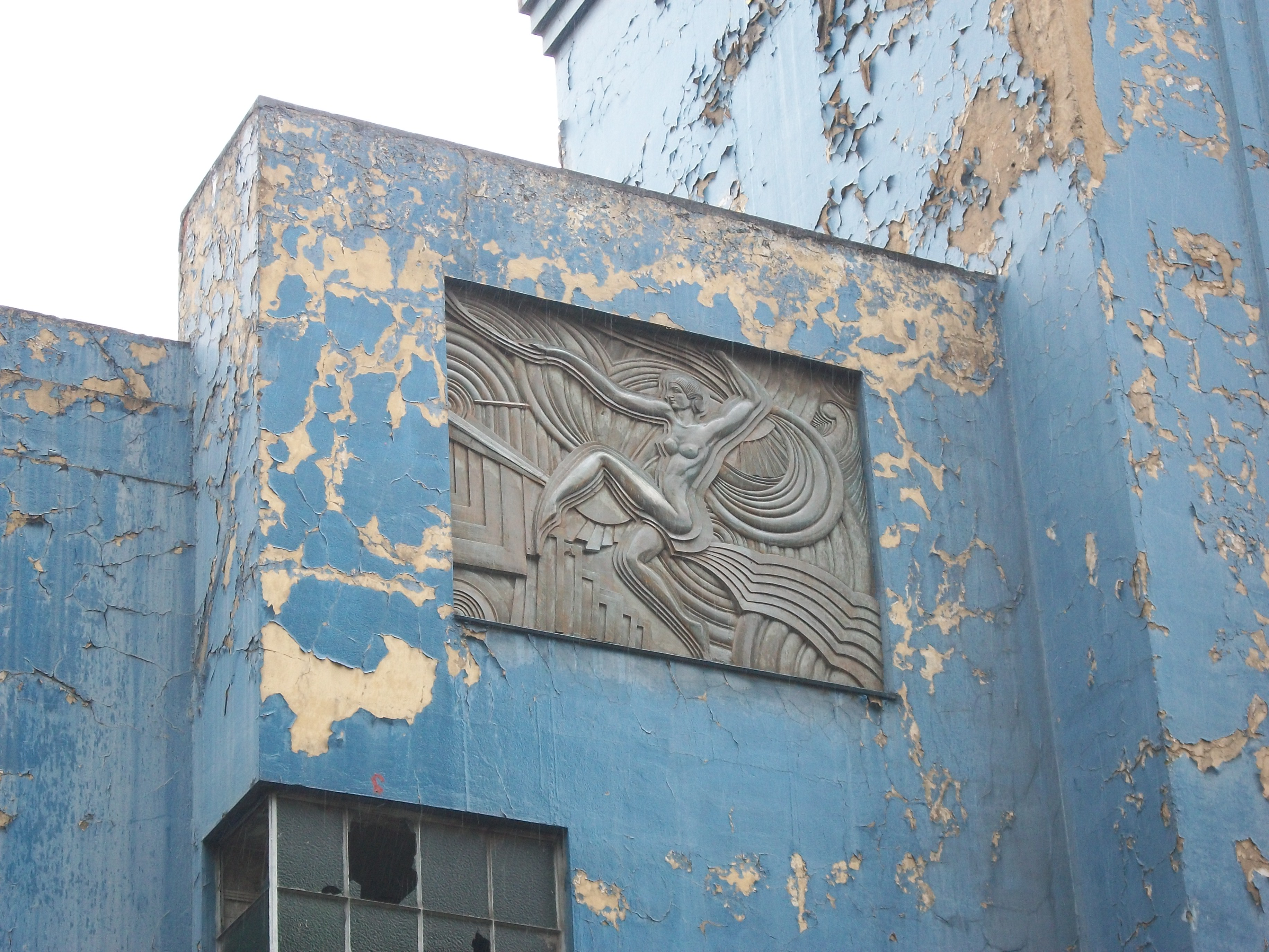 Detalle de la fachada del teatro San Jorge en Bogotá (1935), en la carrera 15 con calle 13.